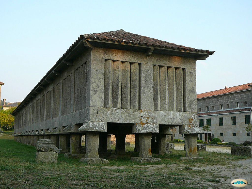 Mosteiro de Poio, hórrea